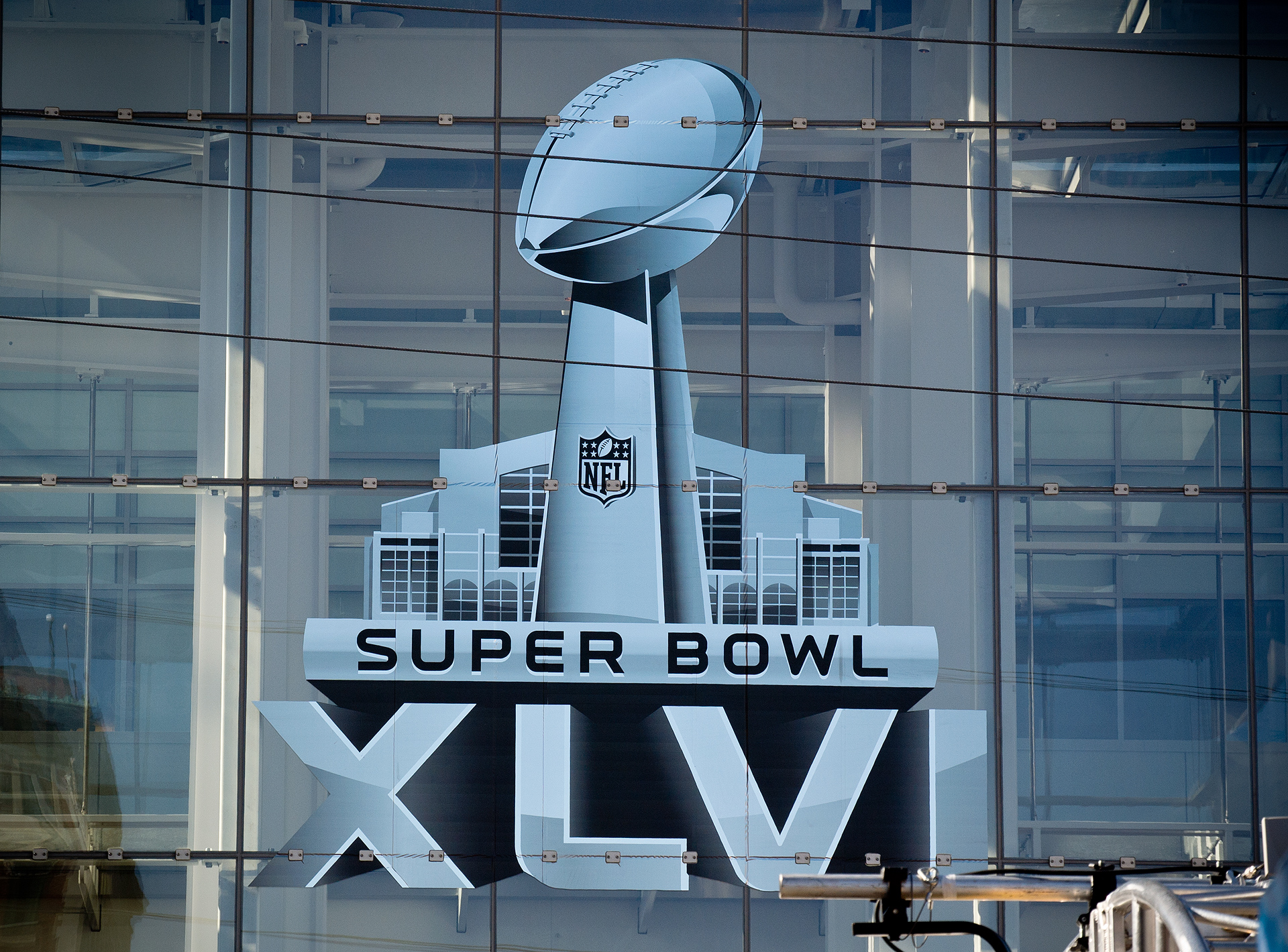 Entrance to Super Bowl Experience